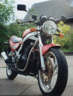 Bild einer Suzuki GS500E Bj 91